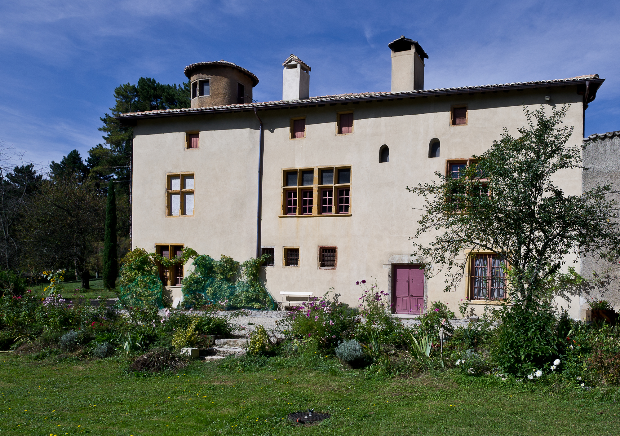 Manoir de la Greysolière, Chemin de Grandvaux (Inscrit, 1992) .